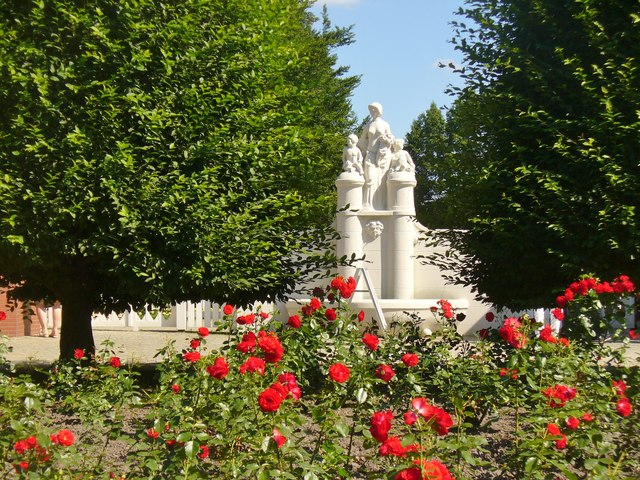 Forst-Rosengarten - Am Rosenbrunnen (Rose Garden - Rose Fountain)